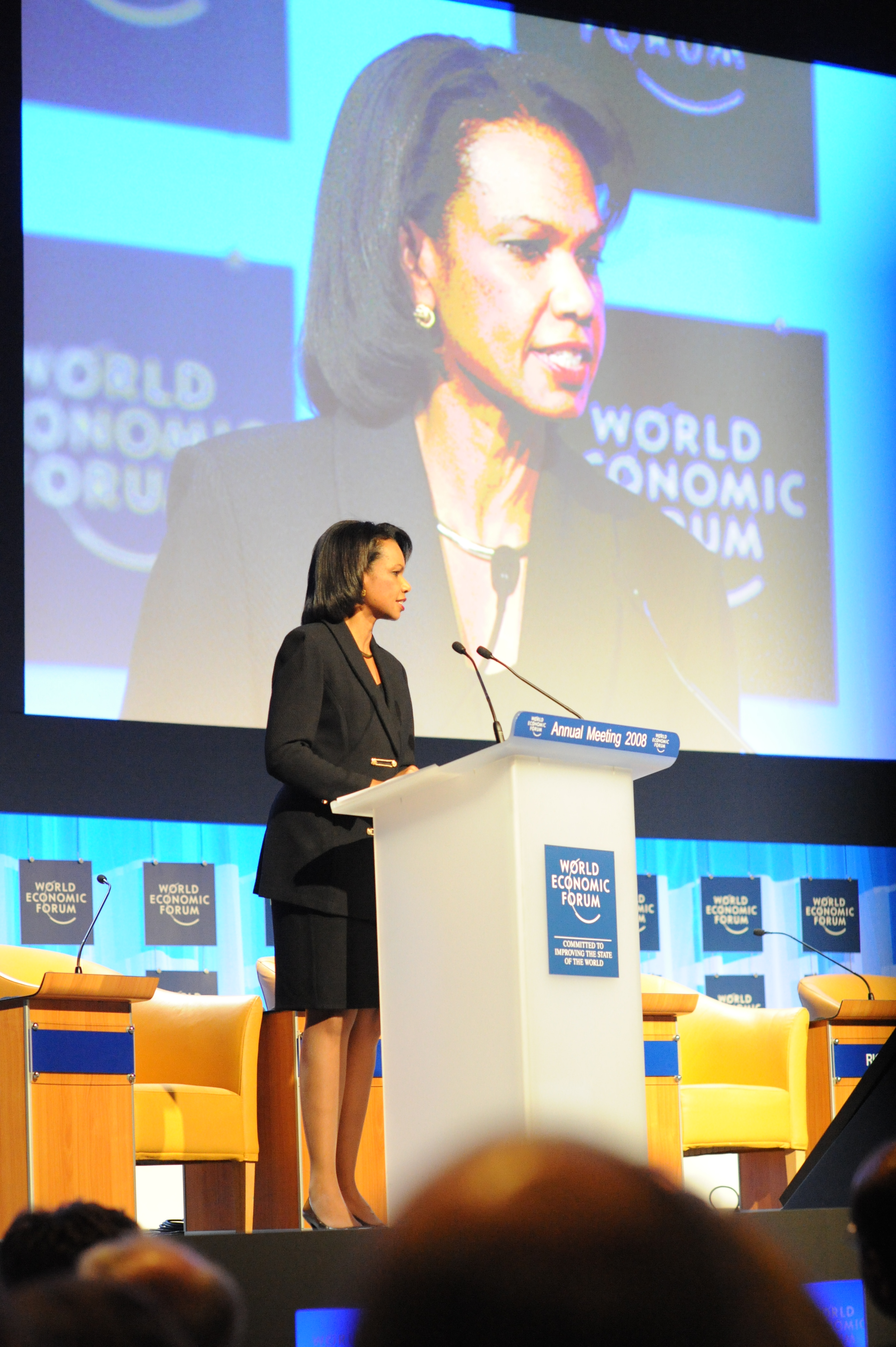 Condoleezza Rice speaks at Davos